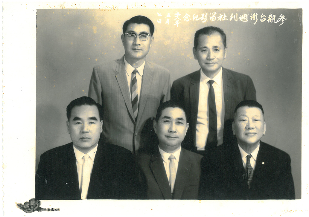 攝於民國58年（1969年）5月7日